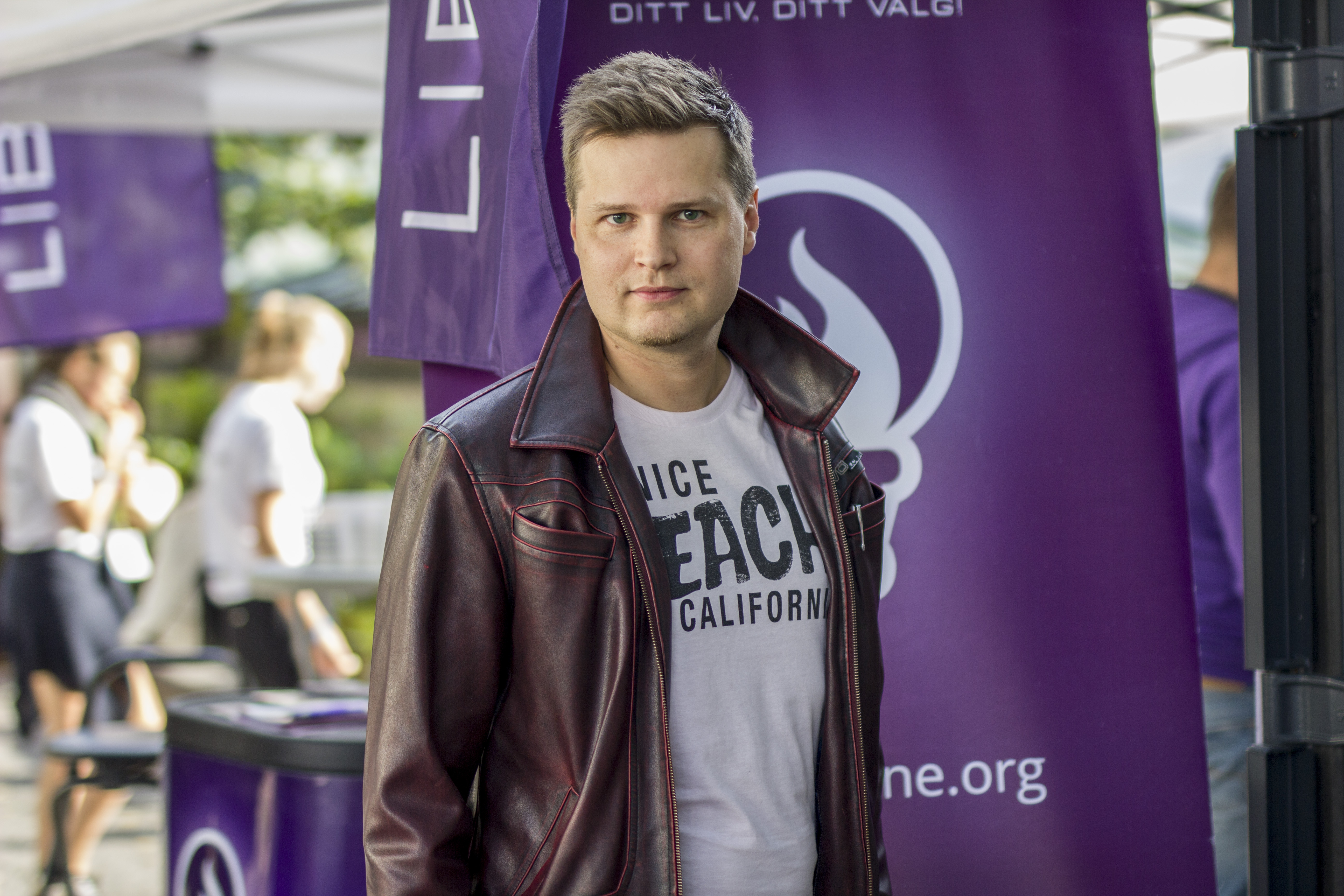 Liberalistene-leder Arnt Rune Flekstad under valgkampen i 2015.